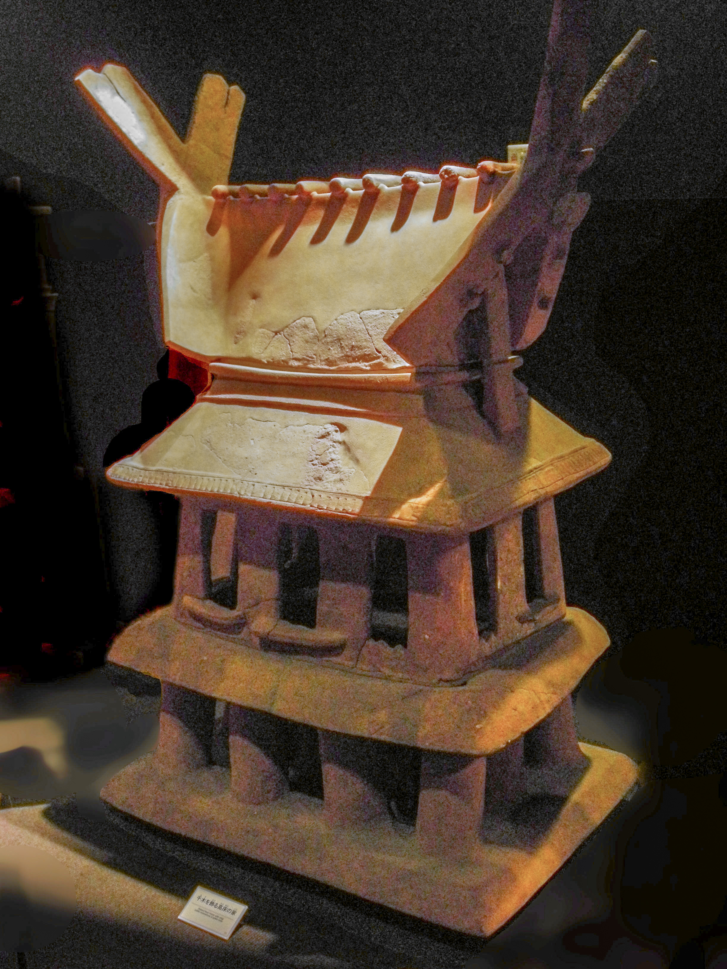 千木を飾る高床の家 今城塚古代歴史館